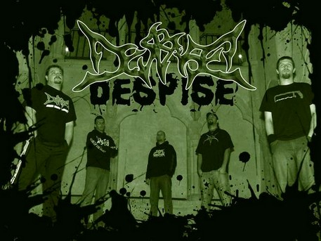 Despise v roce 2006